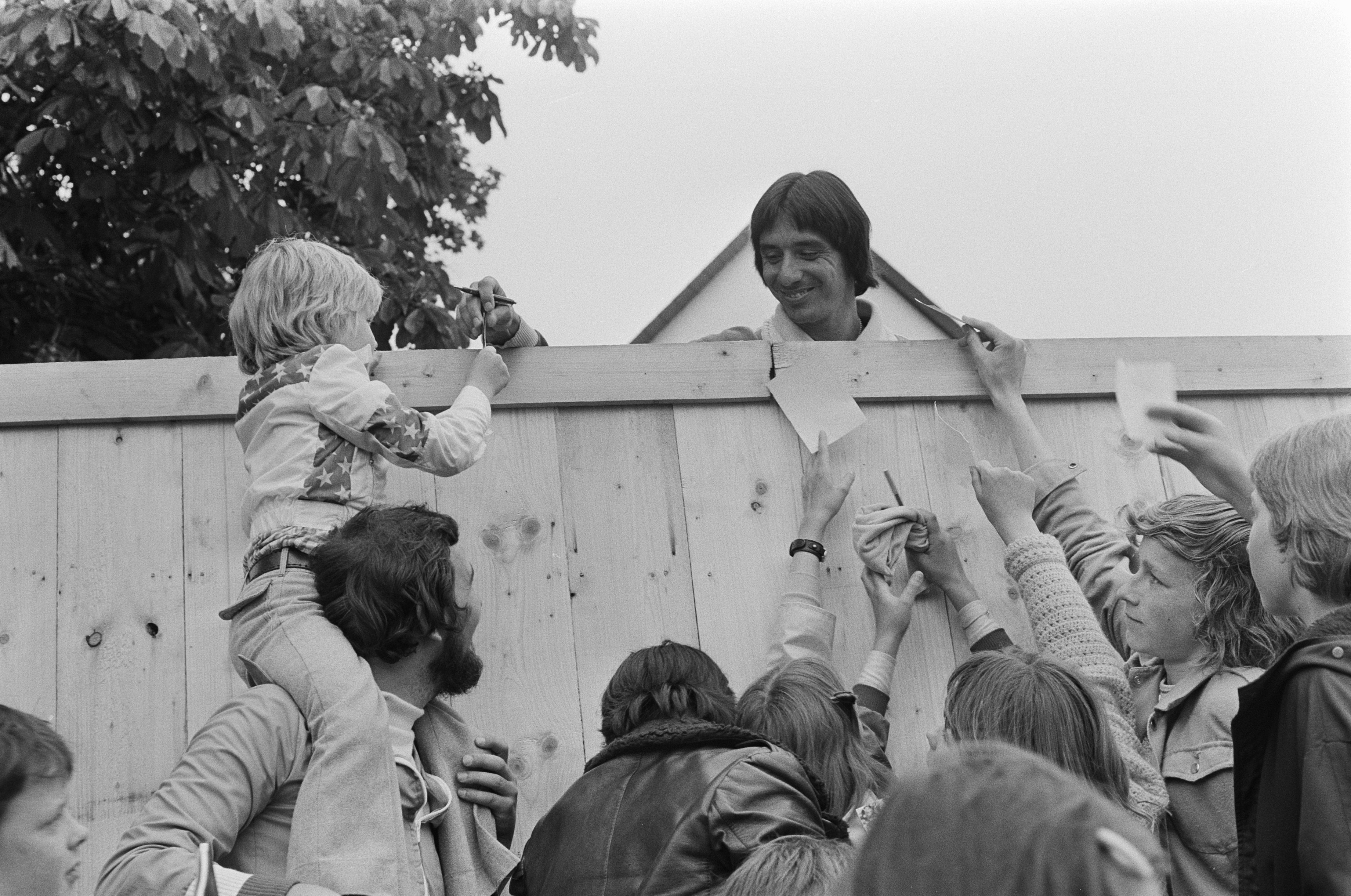 Collectie / Archief : Fotocollectie Anefo Reportage / Serie : [ onbekend ] Beschrijving : WK 74, training Brazilie; doelman Reinato deelt handtekening uit Datum : 1 juli 1974 Trefwoorden : handtekeningen, sport, trainingen, voetbal, wereldkampioenschappen Fotograaf : Mieremet, Rob / Anefo Auteursrechthebbende : Nationaal Archief Materiaalsoort : Negatief (zwart/wit) Nummer archiefinventaris : bekijk toegang 2.24.01.05 Bestanddeelnummer : 927-2962